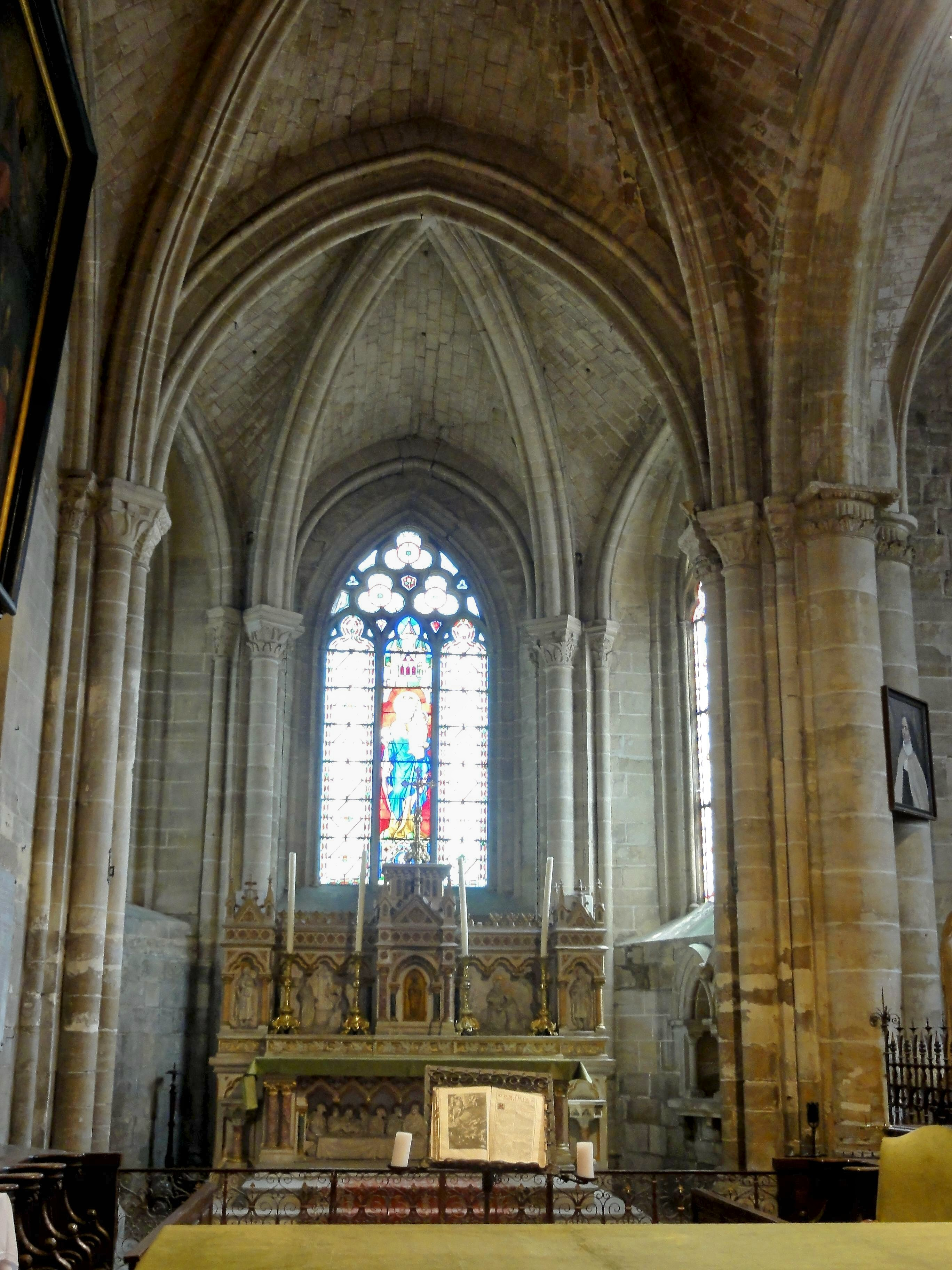 Chœur.